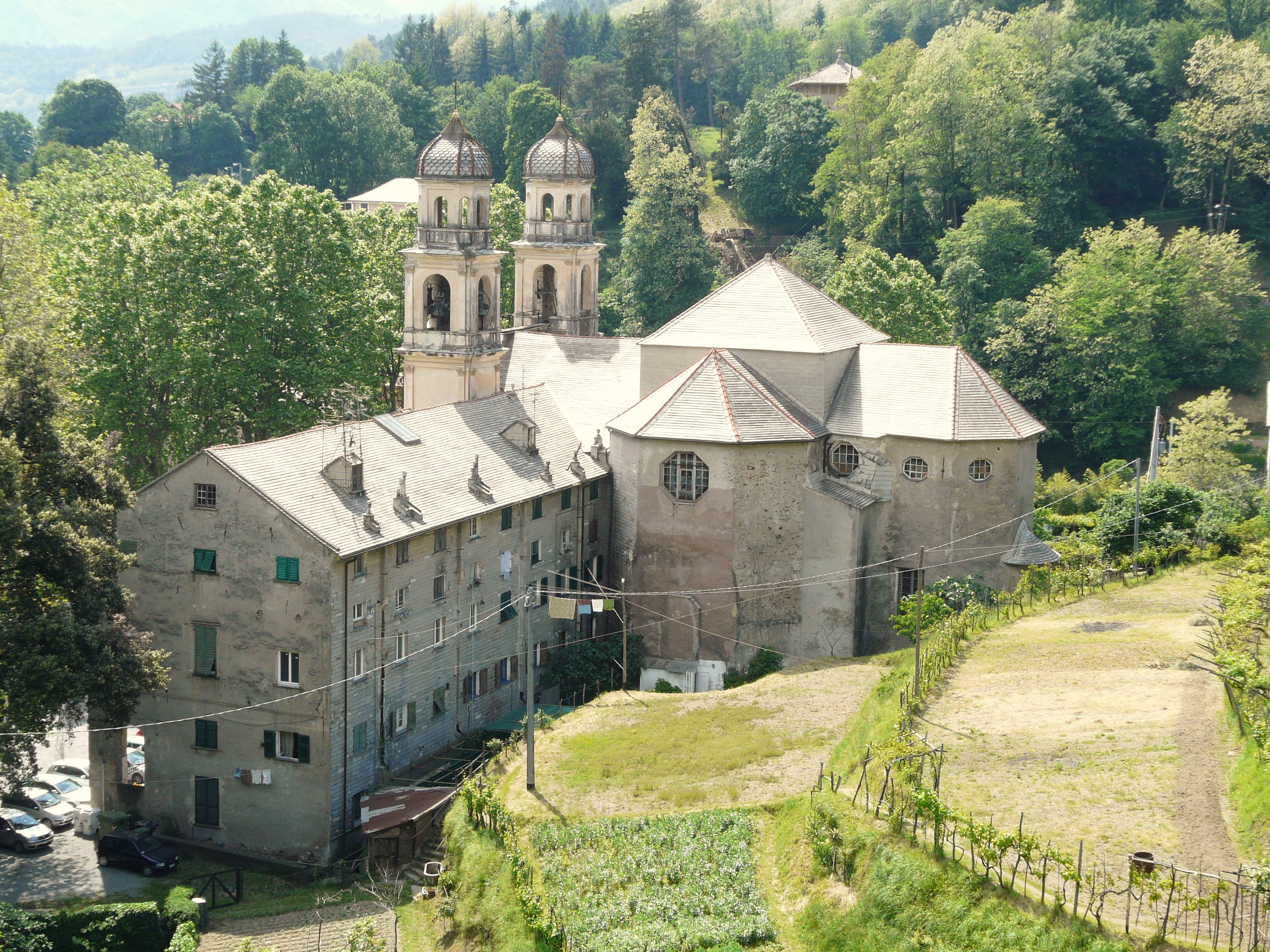 Serie di immagini del santuario di Nostra Signora dell'Acquasanta, Acquasanta, Comune di Genova, Liguria, Italia